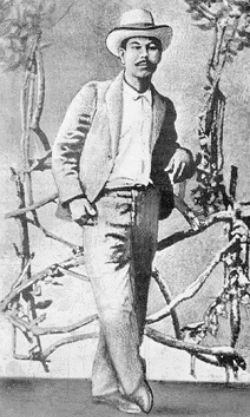 El general zapatista Pablo Torres Burgos